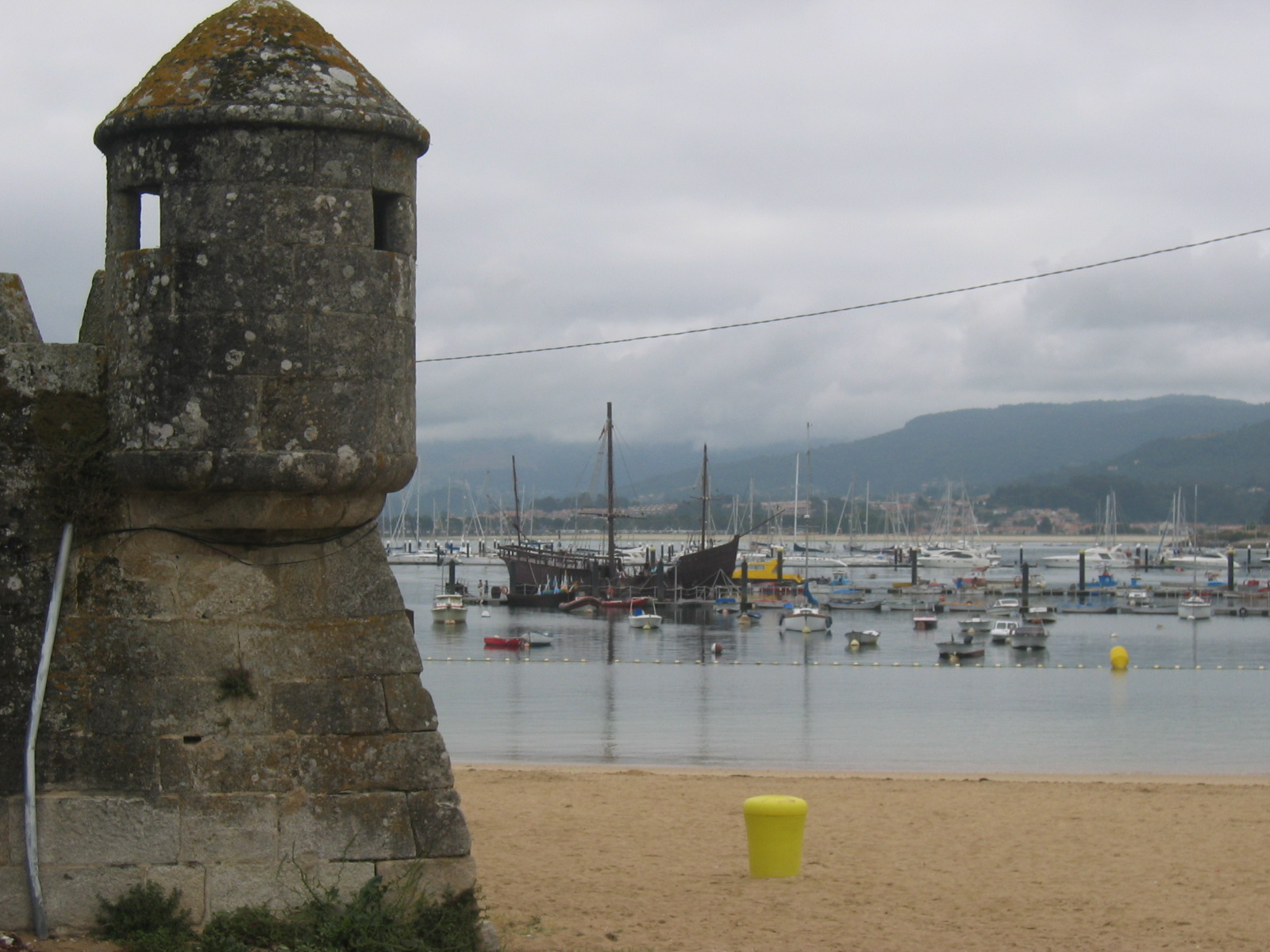 El puerto de Baiona con una réplica de “La Pinta”, el barco con el que Martín Alonso Pinzón llegó a esta villa el 1 de marzo de 1493 trayendo la noticia del descubrimiento de América The harbour of Baiona, Galicia, Spain, with the reconstruction of "La Pinta", one of the three ships of C. Columbus on his first travel. La Pinta was the ship with which he returned from Westindia and landed in 1493 in this harbour. Author: Rolf Thum; own foto, taken in August 2006